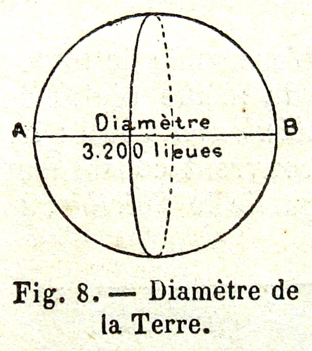 Diamètre de la Terre